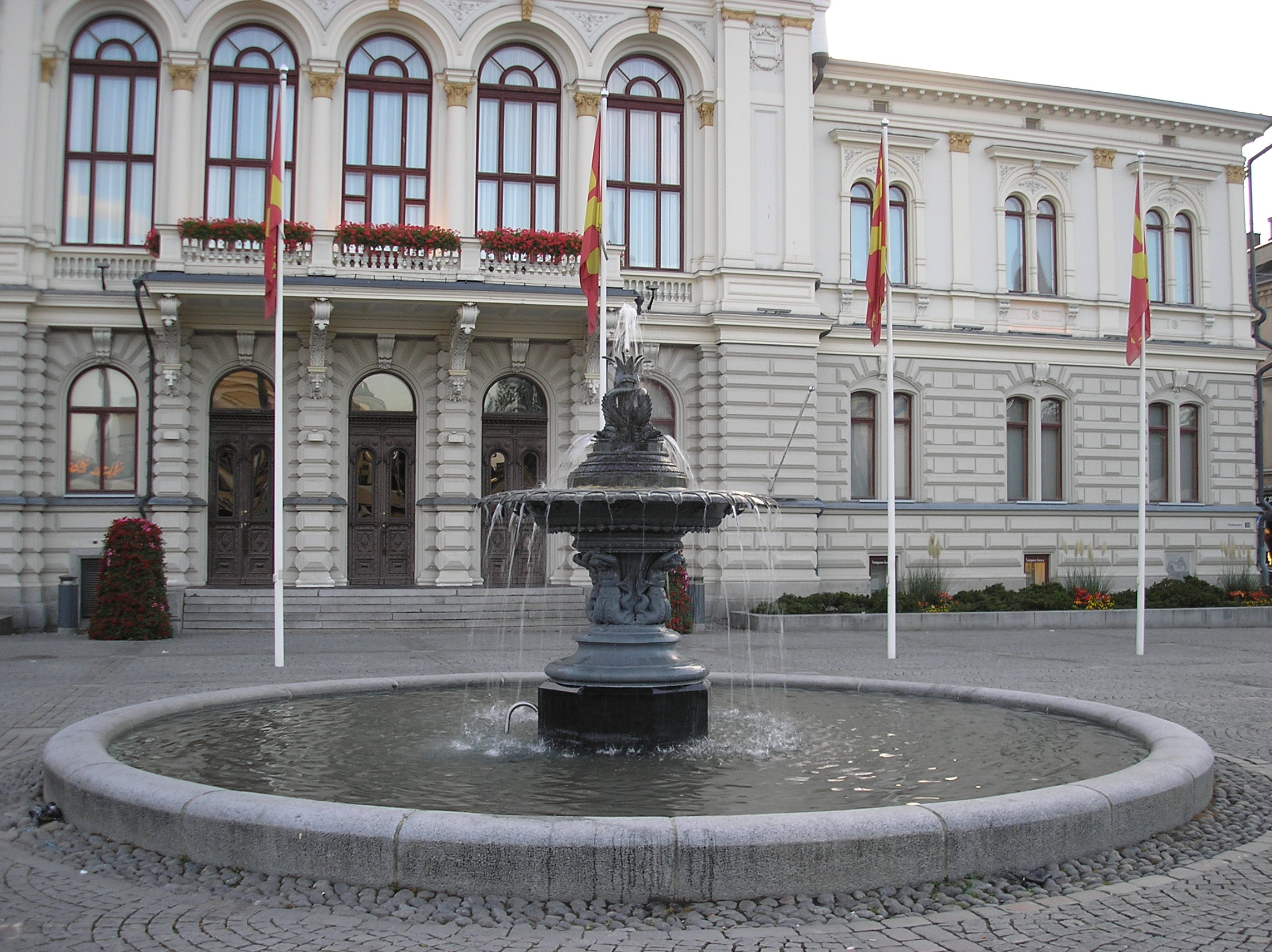 Robert Huberin (1844–1905) vuonna 1883 paljastettu suihkulähde Tampereen Keskustorilla. Taustalla Raatihuone.